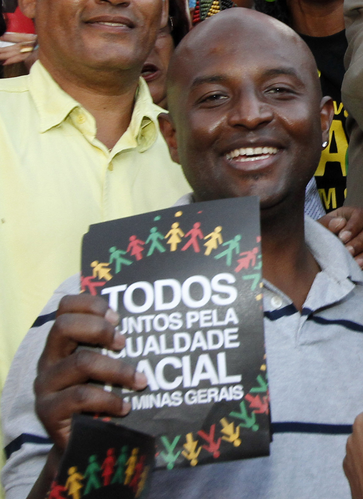 Encontro com o Movimento Negro na praça Carlos Chagas.